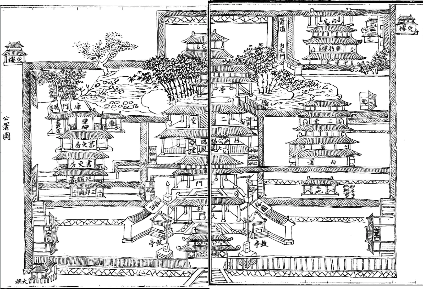 雍正《北新关志》北新关关署图